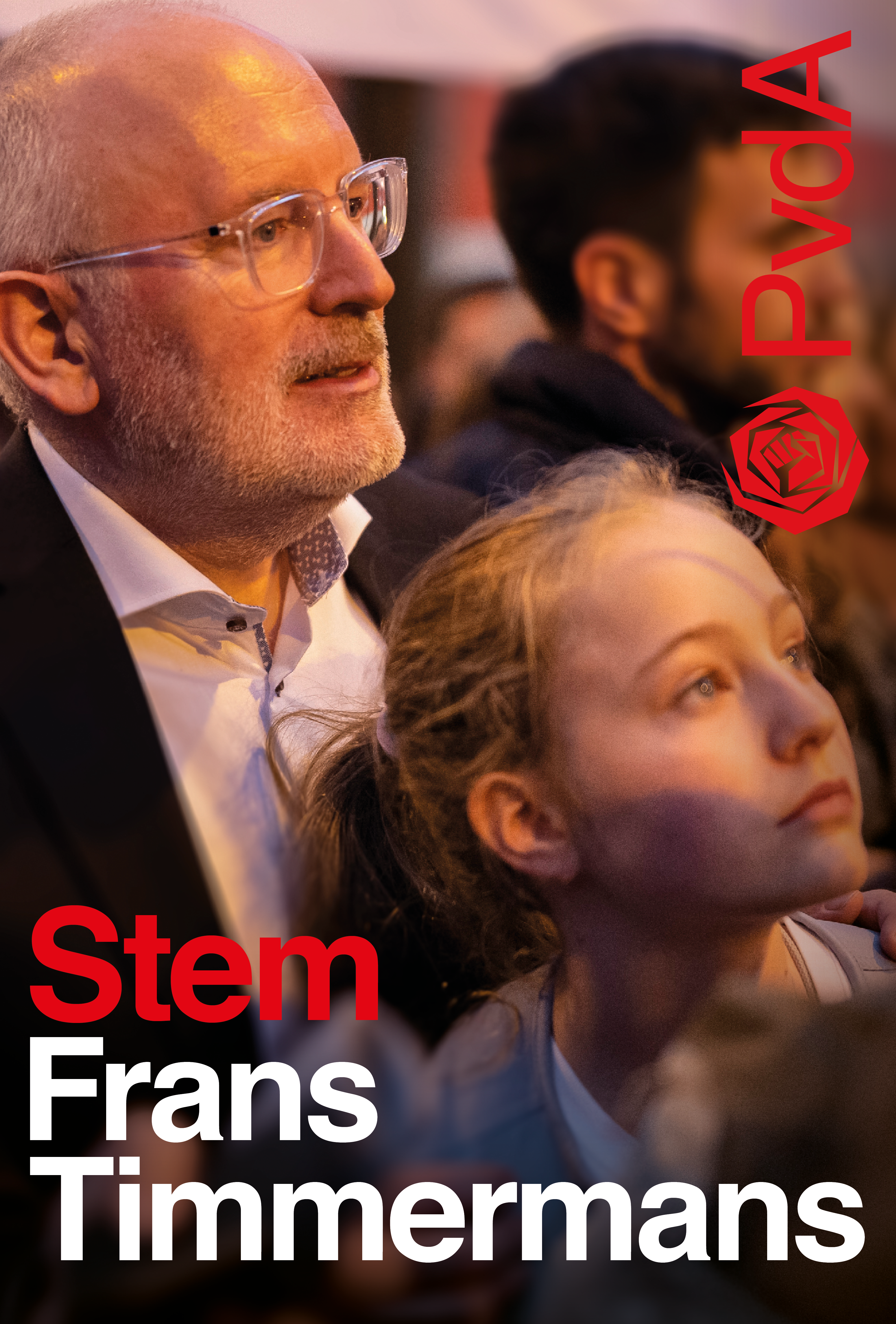 Posters Frans Abri